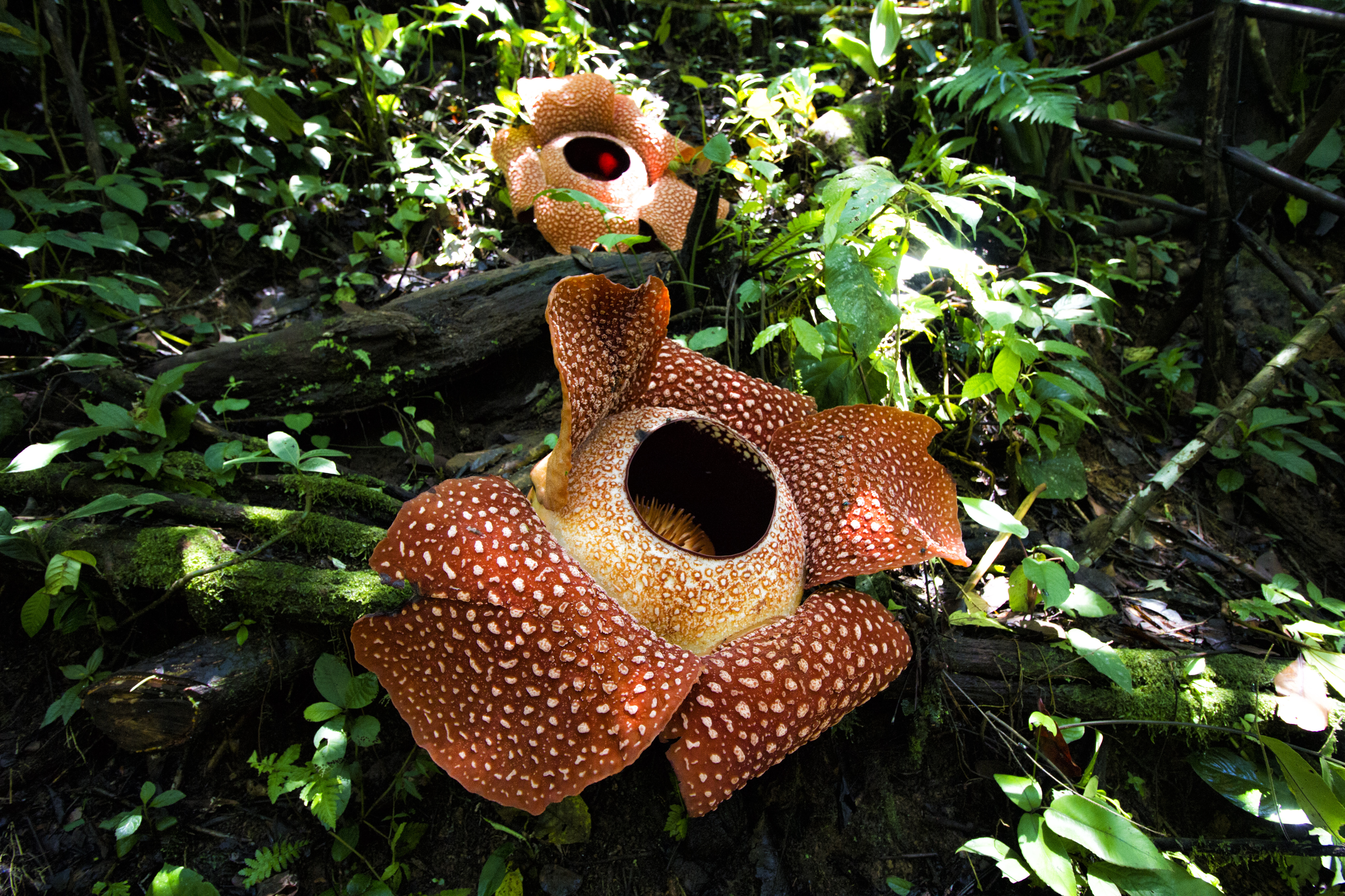 Dua Rafflesia arnoldii mekar di habitatnya di Hutan Lindung Bukit Daun Register 5 Desa Tebat Monok Kabupaten Kepahiang Provinsi Bengkulu pada 21 April 2015. Rafflesia arnoldii atau padma raksasa merupakan tumbuhan parasit obligat yang tumbuh pada batang liana (tumbuhan merambat) dari genus Tetrastigma. Rafflesia arnoldii pertama kali ditemukan pada tahun 1818 di hutan tropis Bengkulu oleh seorang pemandu yang bekerja pada Dr. Joseph Arnold yang sedang mengikuti ekspedisi Thomas Stanford Raffles, sehingga tumbuhan ini diberi nama sesuai sejarah penemunya yakni penggabungan antara Raffles dan Arnold. Rafflesia arnoldii tidak memiliki daun sehingga tidak mampu melakukan fotosintesis sendiri dan mengambil nutrisi dari pohon inangnya. Bentuk yang terlihat dari bunga Raflesia ini hanya bunganya saja yang berkembang dalam kurun waktu tertentu. Keberadaannya seakan tersembunyi selama berbulan-bulan di dalam tubuh inangnya hingga akhirnya tumbuh bunga yang hanya mekar seminggu. Bunga Raflesia adalah identitas provinsi Bengkulu dan sebagai salah satu puspa langka dari tiga bunga nasional Indonesia mendampingi puspa bangsa (melati putih atau Jasminum sambac) dan puspa pesona (anggrek bulan atau Phalaenopsis amabilis) berdasarkan Kepres No 4 Tahun 1993 tentang Satwa dan Bunga Nasional.